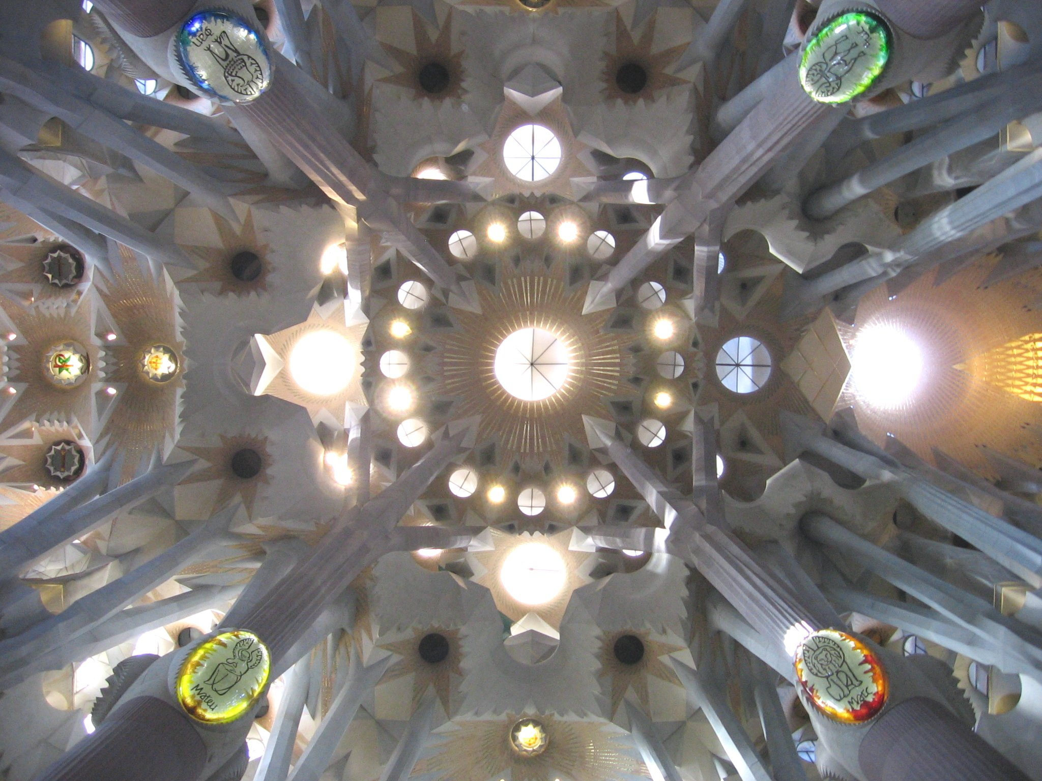 Volta del transsepte de la Sagrada Família.